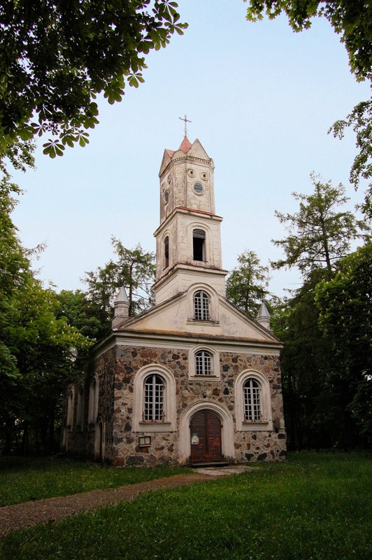 Bažnyčia.